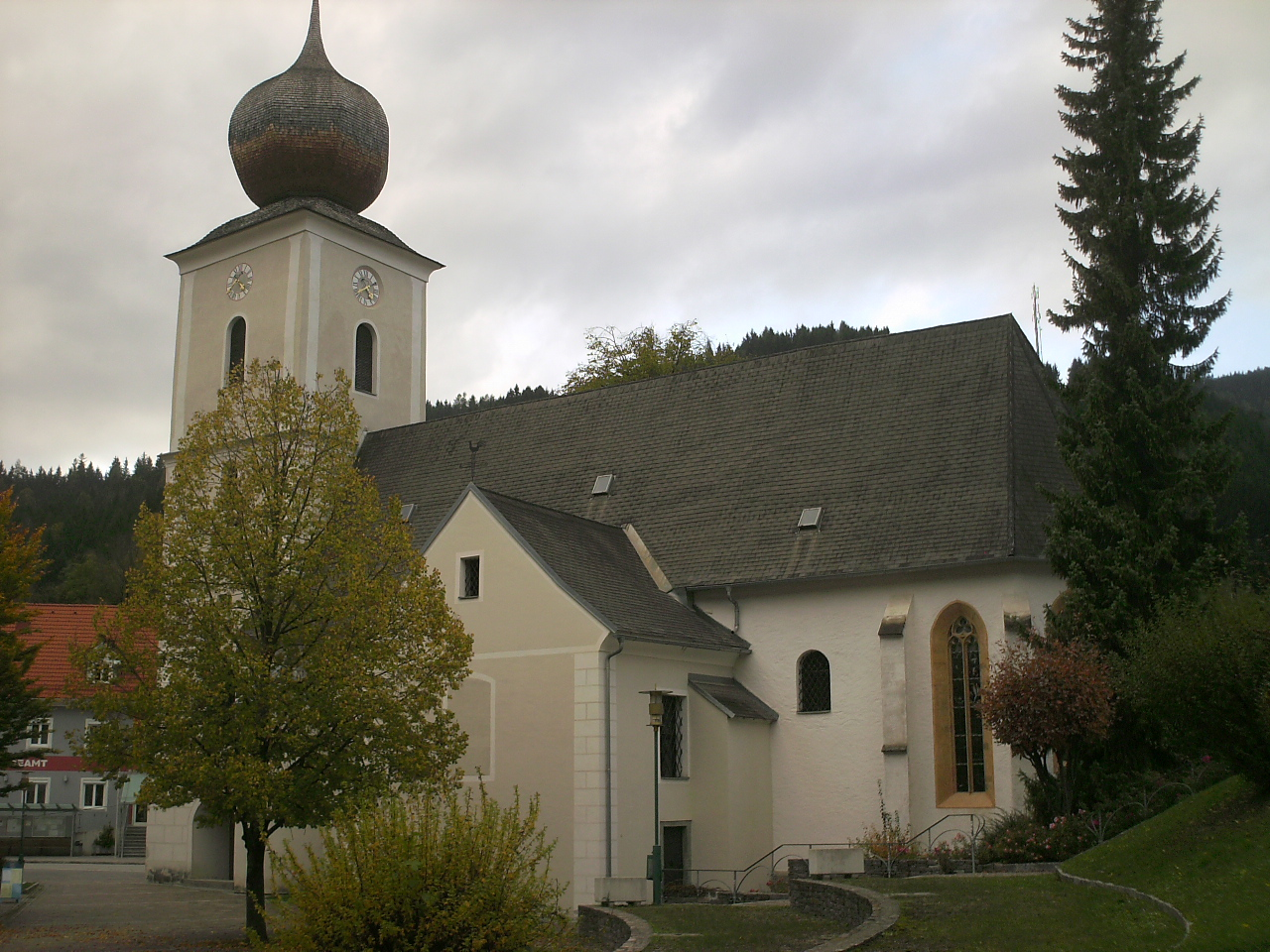 Kath. Filialkirche hl. Jakob in der Breitenau und ehem. Friedhof.